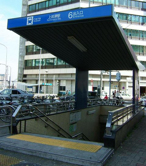 名古屋市中区上前津に所在する名古屋市営地下鉄名城線・鶴舞線の上前津駅の6番出入口。上前津交差点の南西側に位置する。投稿者 Gnsin 撮影日&場所 2005年3月6日(日) 名古屋市中区の上前津駅6番口前にて撮影。